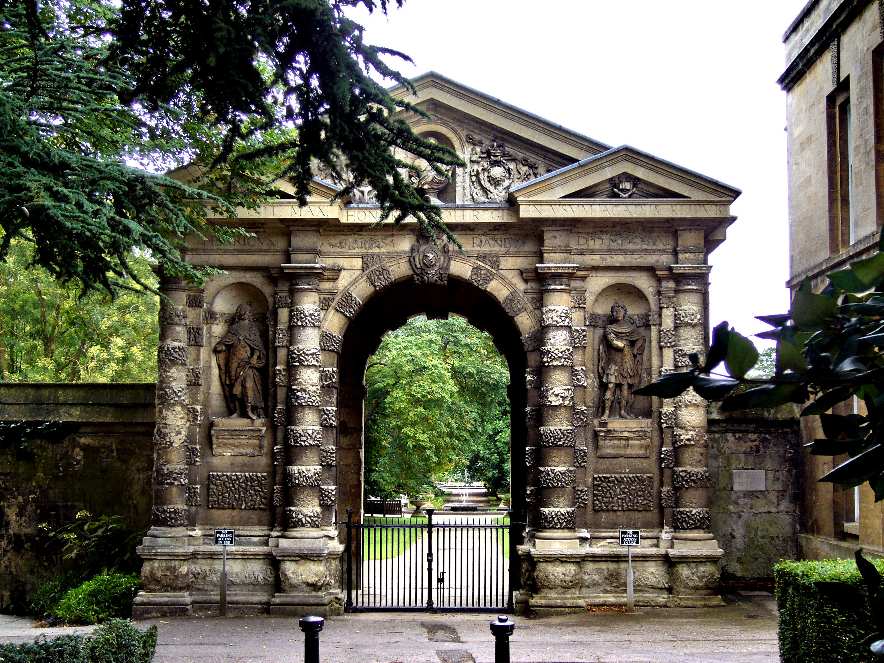 Oxford